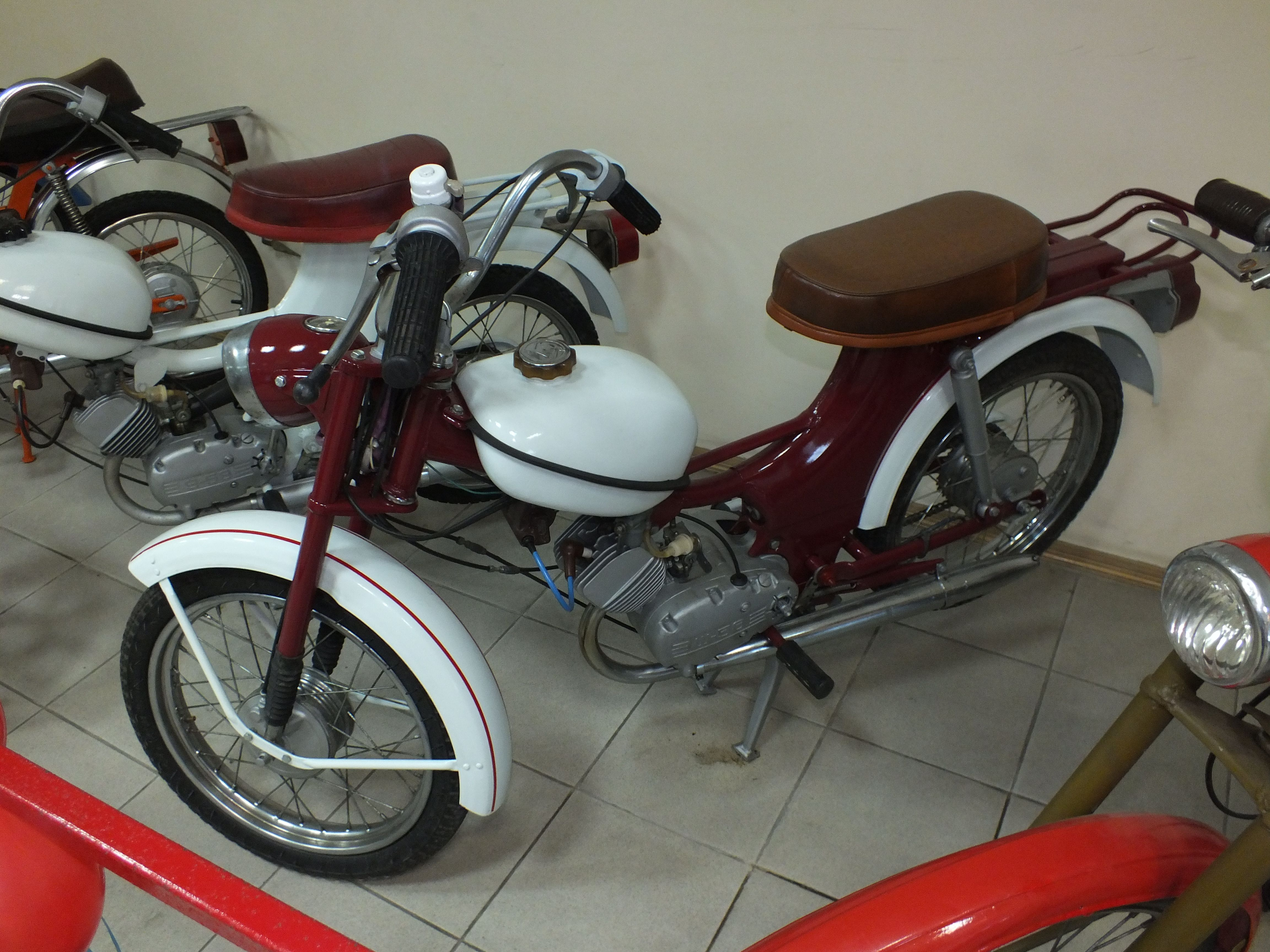 Мопеды "Рига"